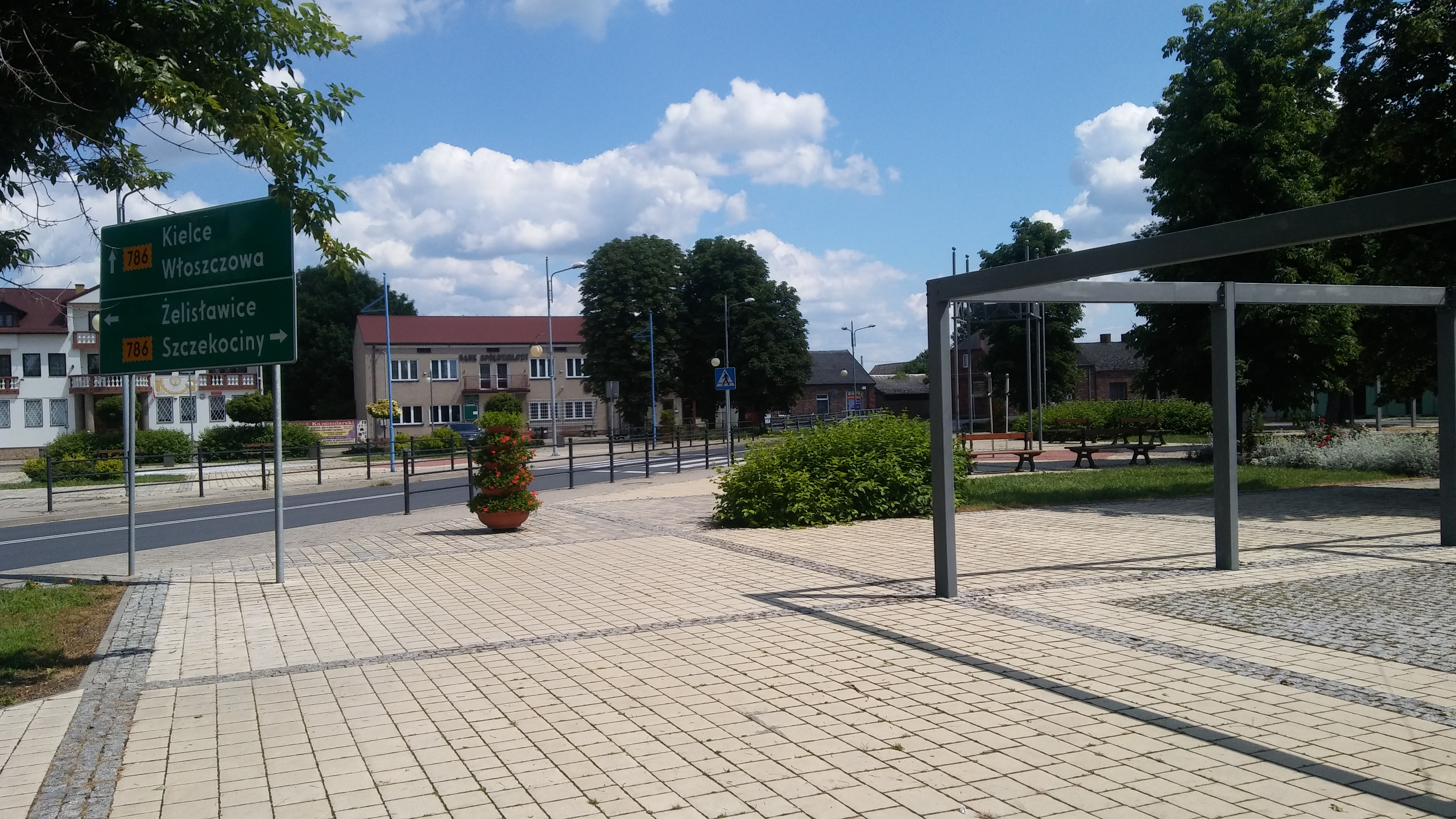 Rynek w Seceminie